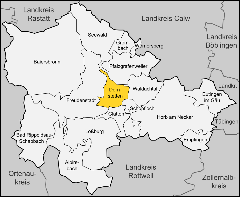 Karte der Stadt Dornstetten im Landkreises Freudenstadt